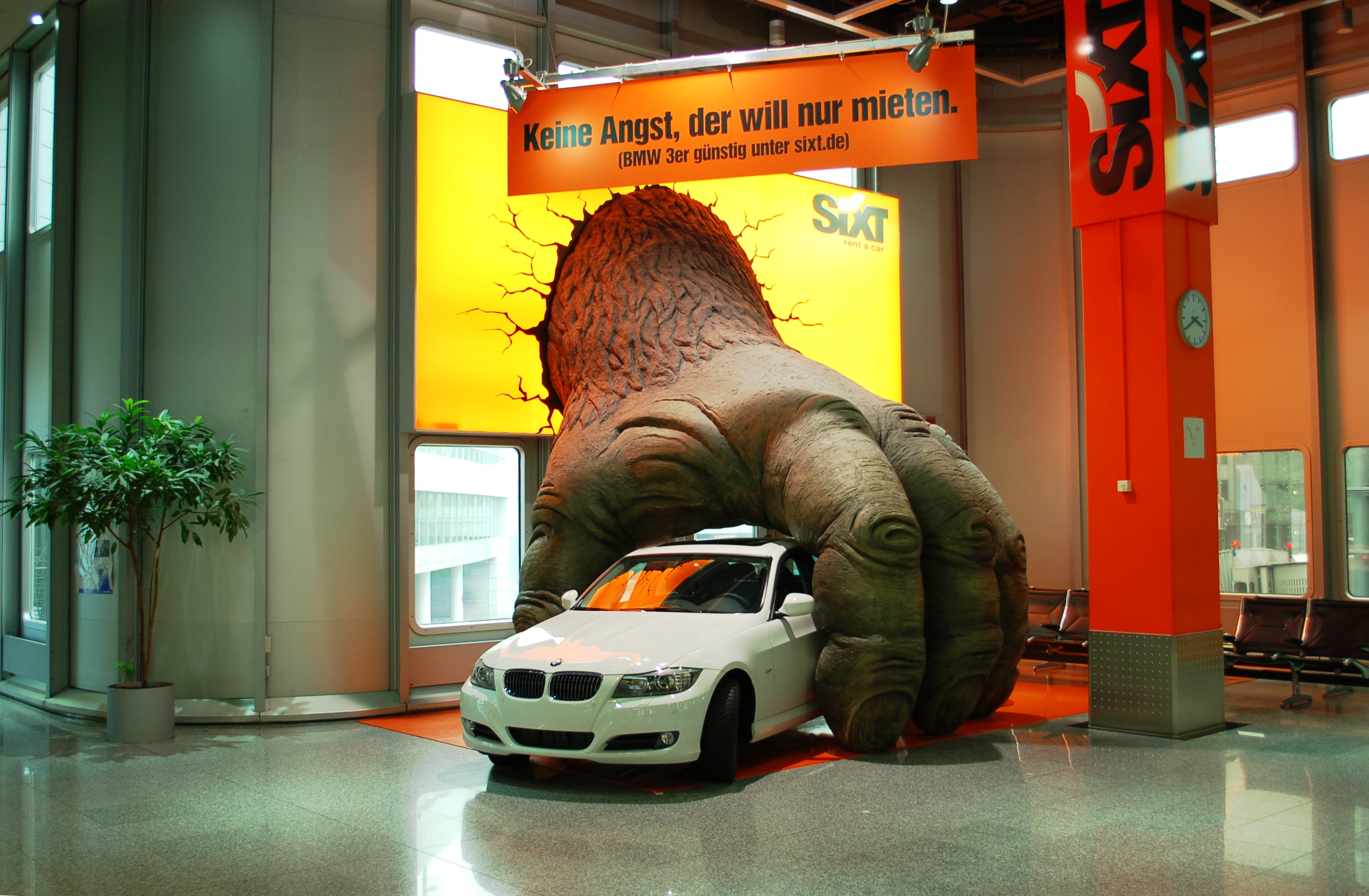 "Keine Angst, der will nur mieten" - Sixt-Werbung im Flughafenterminal Düsseldorf, BMW